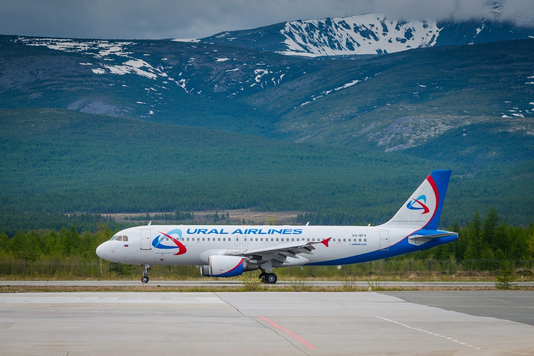 А320 авиакомпании "Уральские авиалинии" впервые прибыл в Магадан